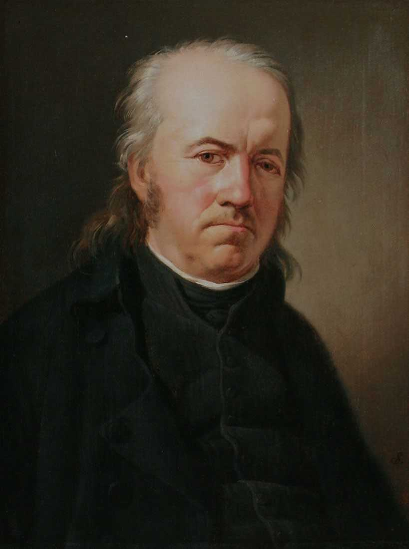 Porträt des Gottlieb Christian Bohnenberger, Künstler Johann Baptist Seele